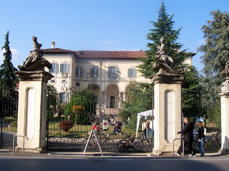 Brugherio - Villa Sormani Andreani